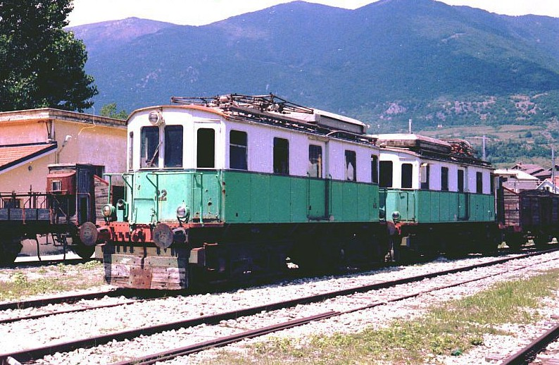 Le locomotive elettriche nr. 22 e 25 della Società Anonima Ferrovie Adriatico Appennino (FAA). Erano impiegate un tempo sulla ferrovia Sangritana e nel 2006 risultavano accantonate a Crocetta.